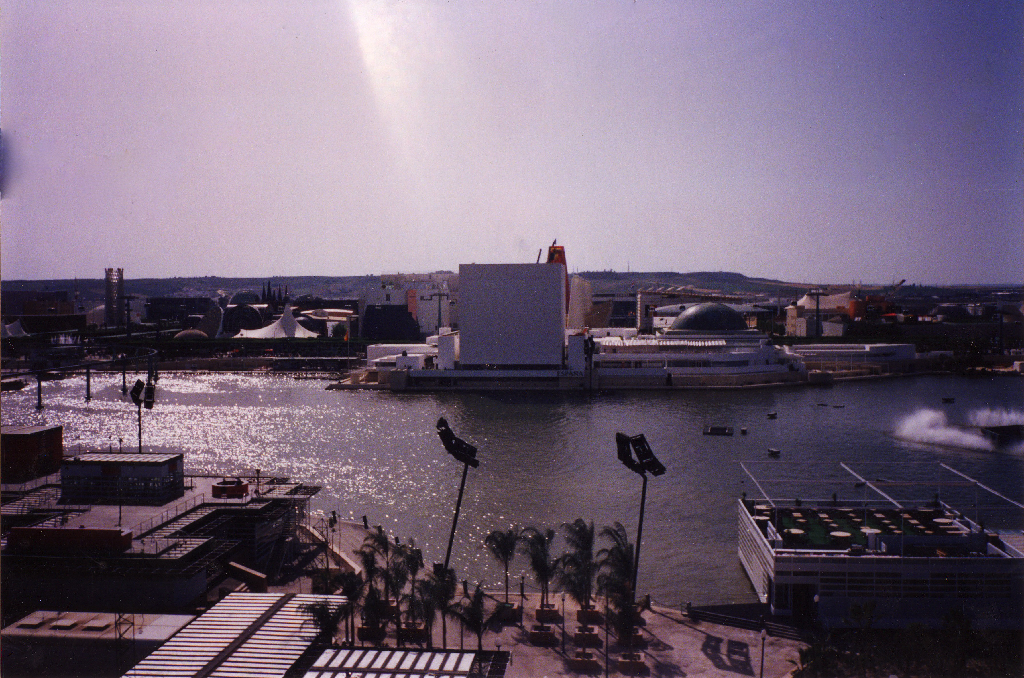 Exposición Universal Sevilla 92. Viaje en Abril